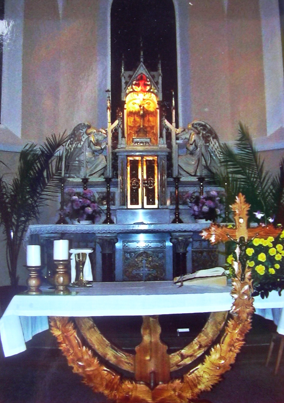 Interiér kostela v Podbřežicích (Vyškov- Czech republic)